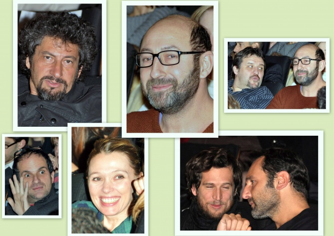 De gauche à droite et de haut en bas : Radu Mihaileanu, Kad Merad, Guy Lecluyse, (Kad Merad), Lionel Abelanski, Anne Marivin, Guillaume Canet, Gilles Lellouche, à l'avant-première du film Le Siffleur.